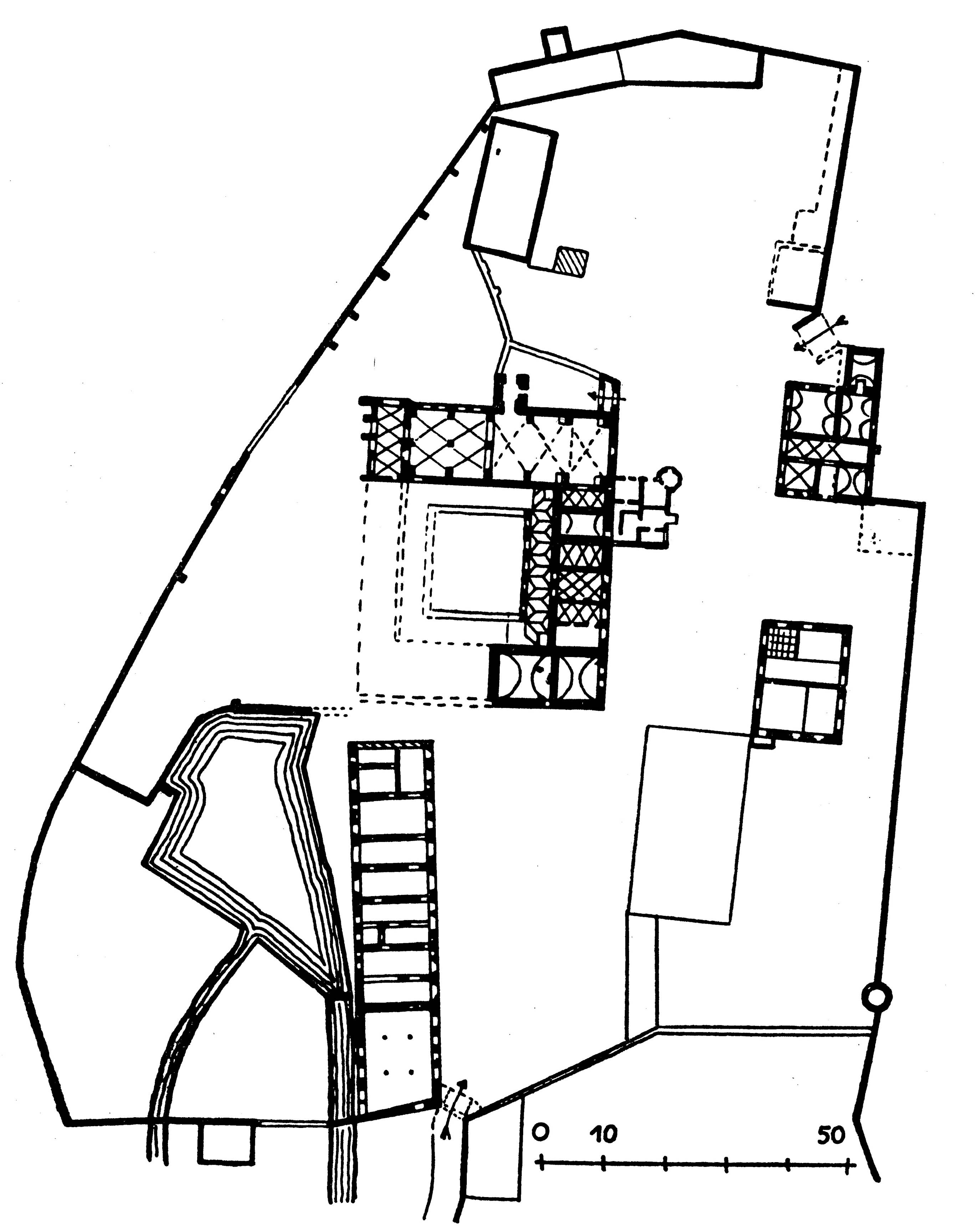 Grundriss des ehemaligen Benediktinerinnenklosters Urspring